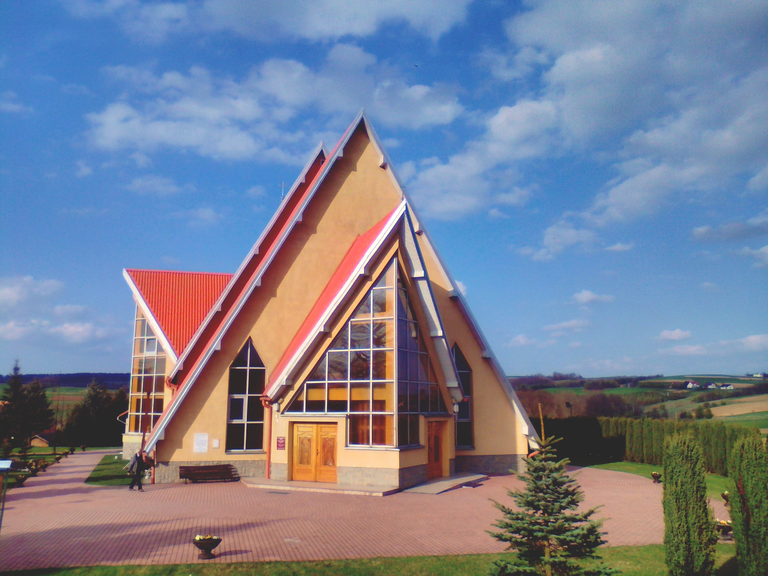 Rożnowice - rzymskokatolicki kościół parafialny pw. Matki Bożej Fatimskiej, 1993-1997